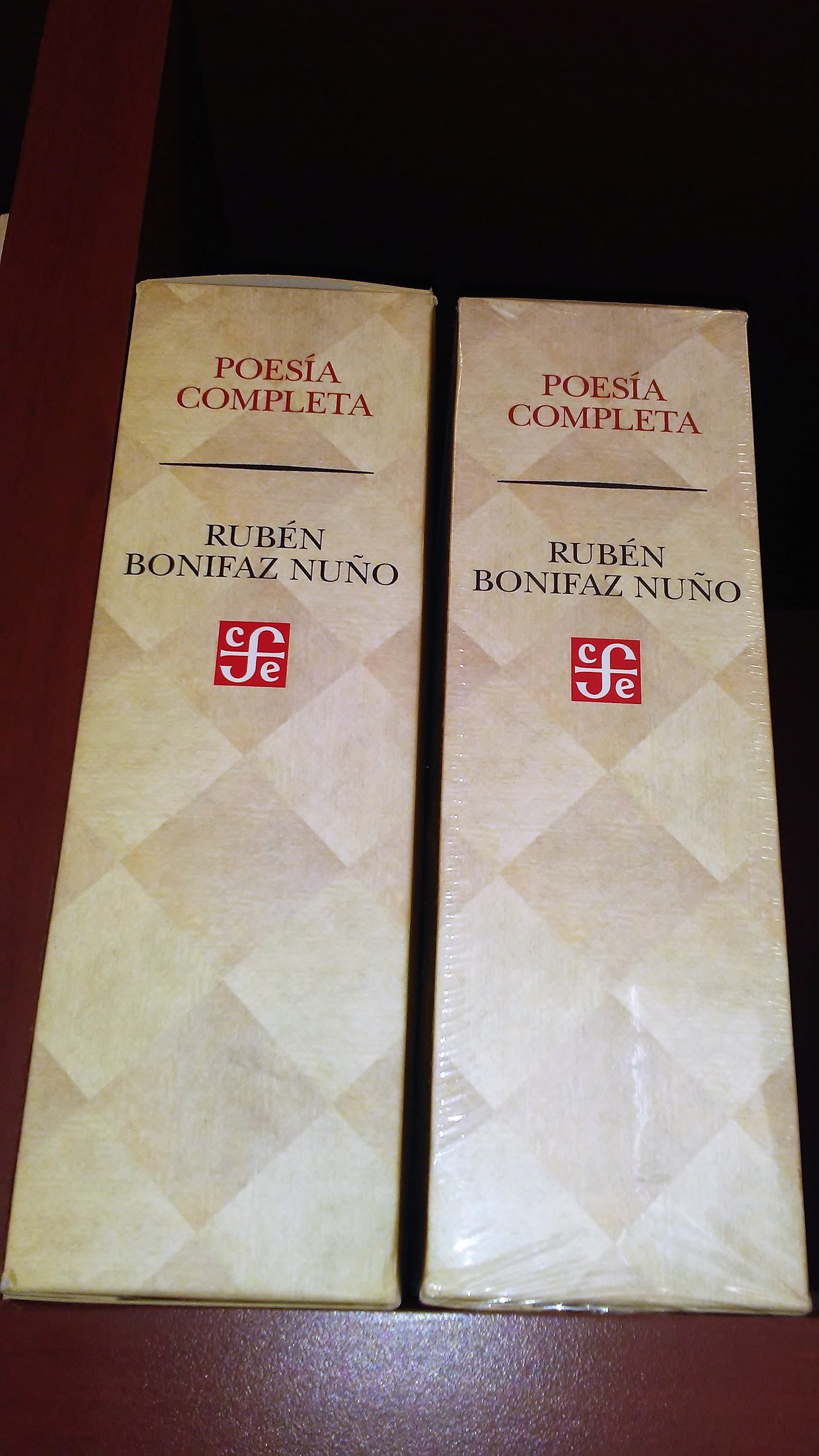 Volúmenes de la Poesía Completa de Rubén Bonifaz Nuño